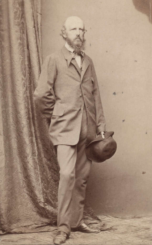 Der deutsche Jurist und Island-Forscher Konrad von Maurer (1823-1902)